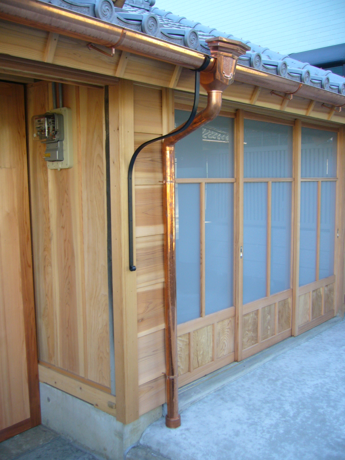 Drainspout,amadoi,katori-city,japan